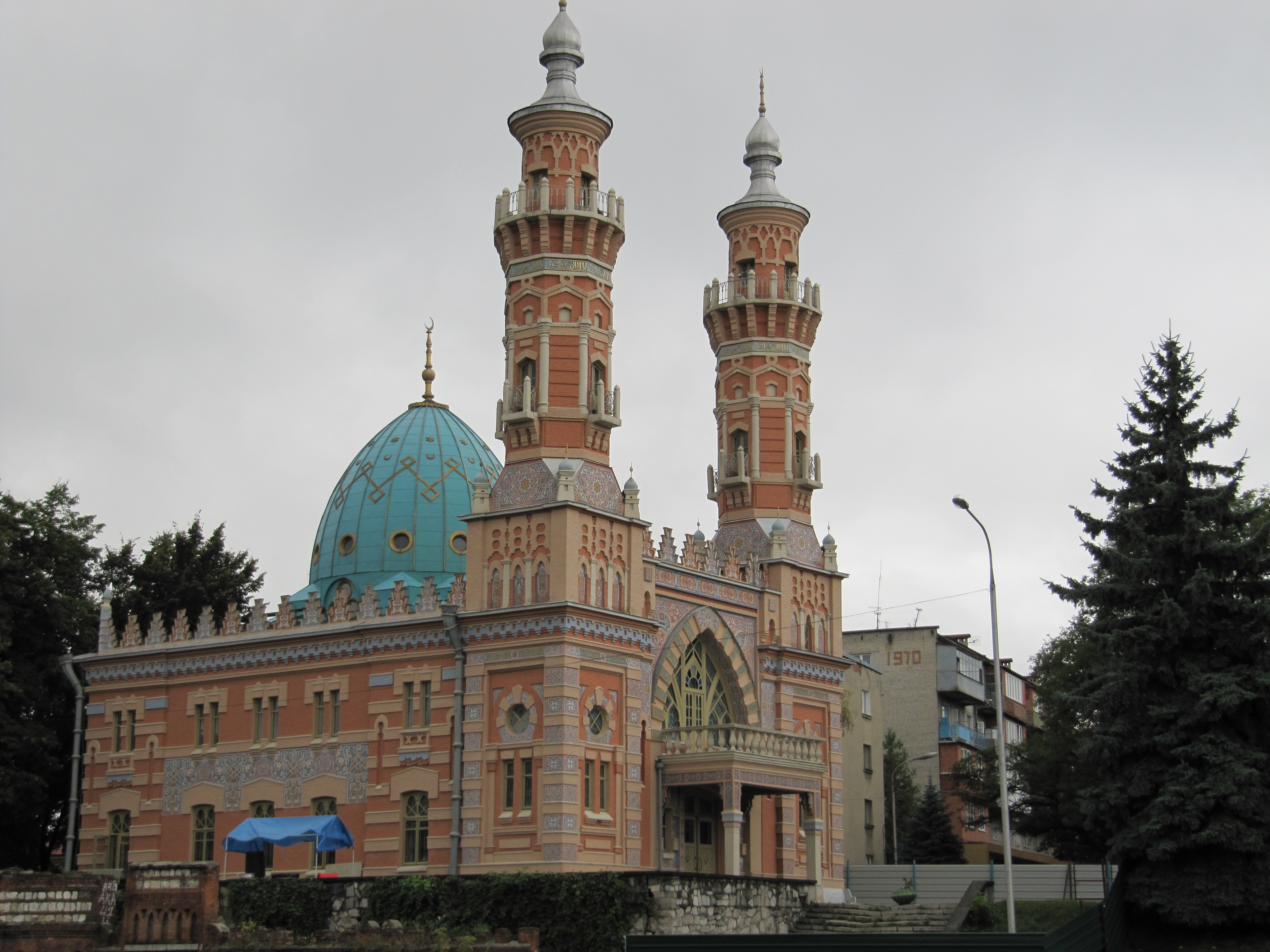 Moskeo en Vladikavkaz, nomita omaĝe al ĝia azeria financinto Moskeo Muĥtarov.